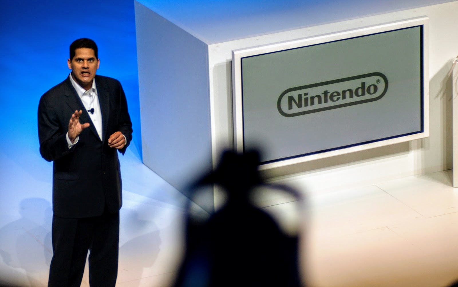 Reggie Fils-Aimé, en la conferencia de Nintendo dentro del Nokia Theatre, durante la celebración de la feria E3 2009.